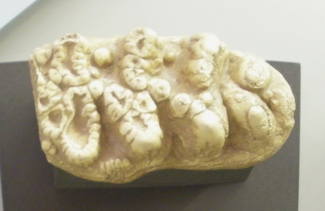 Fossil of Choerolophodon, an extinct proboscidean- Took the photo at Senckenberg Museum of Frankfurt